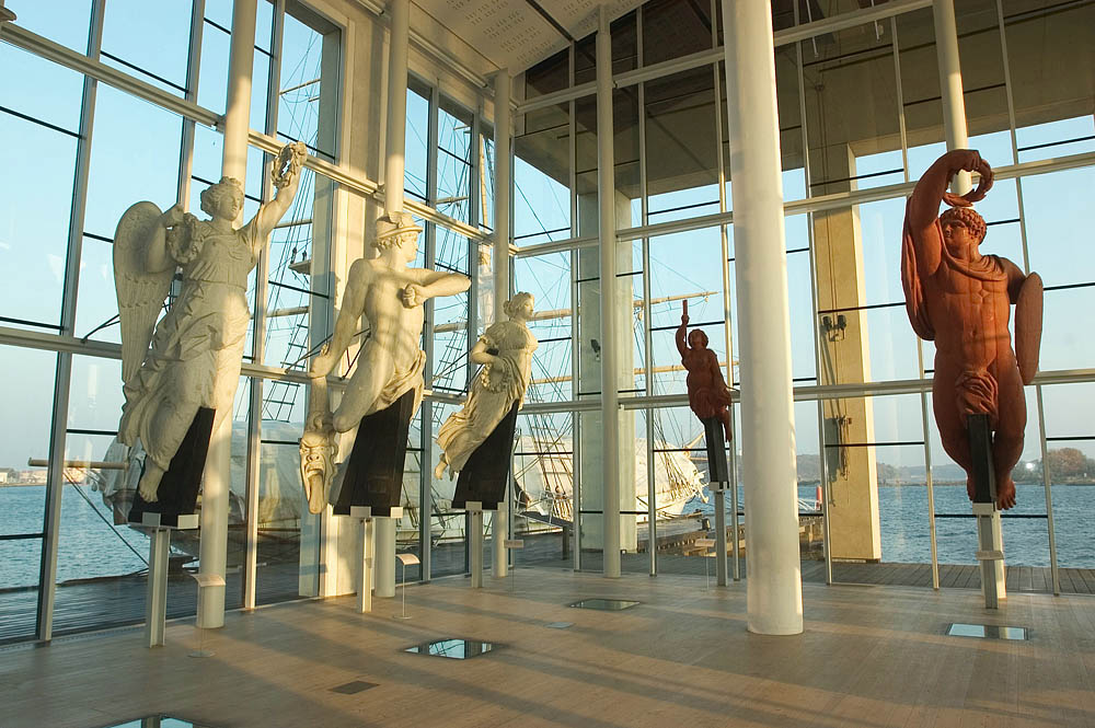 Marinmuseums Galjonshall